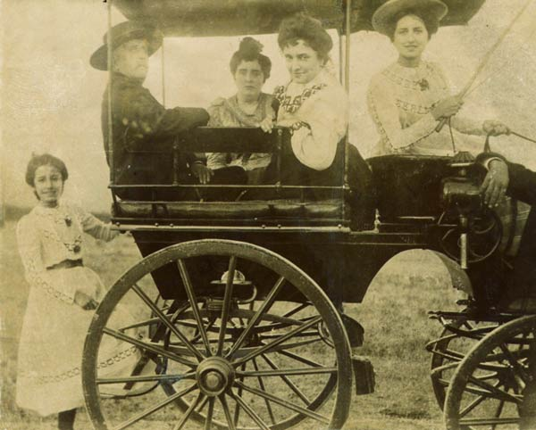 Carruaje en Morón de la Frontera (Sevilla) en torno al año 1900